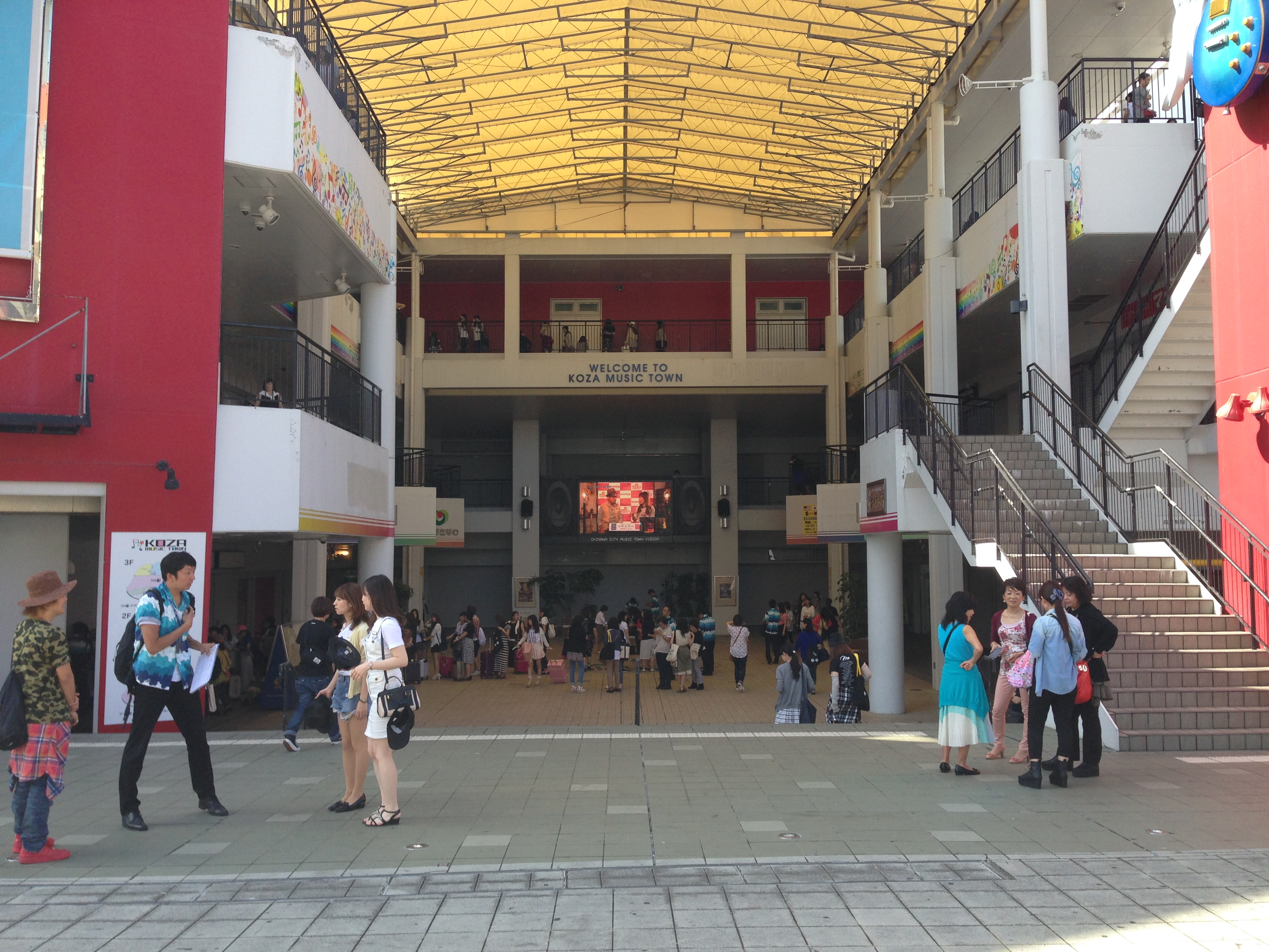 コザミュージックタウン音市場の吹き抜け